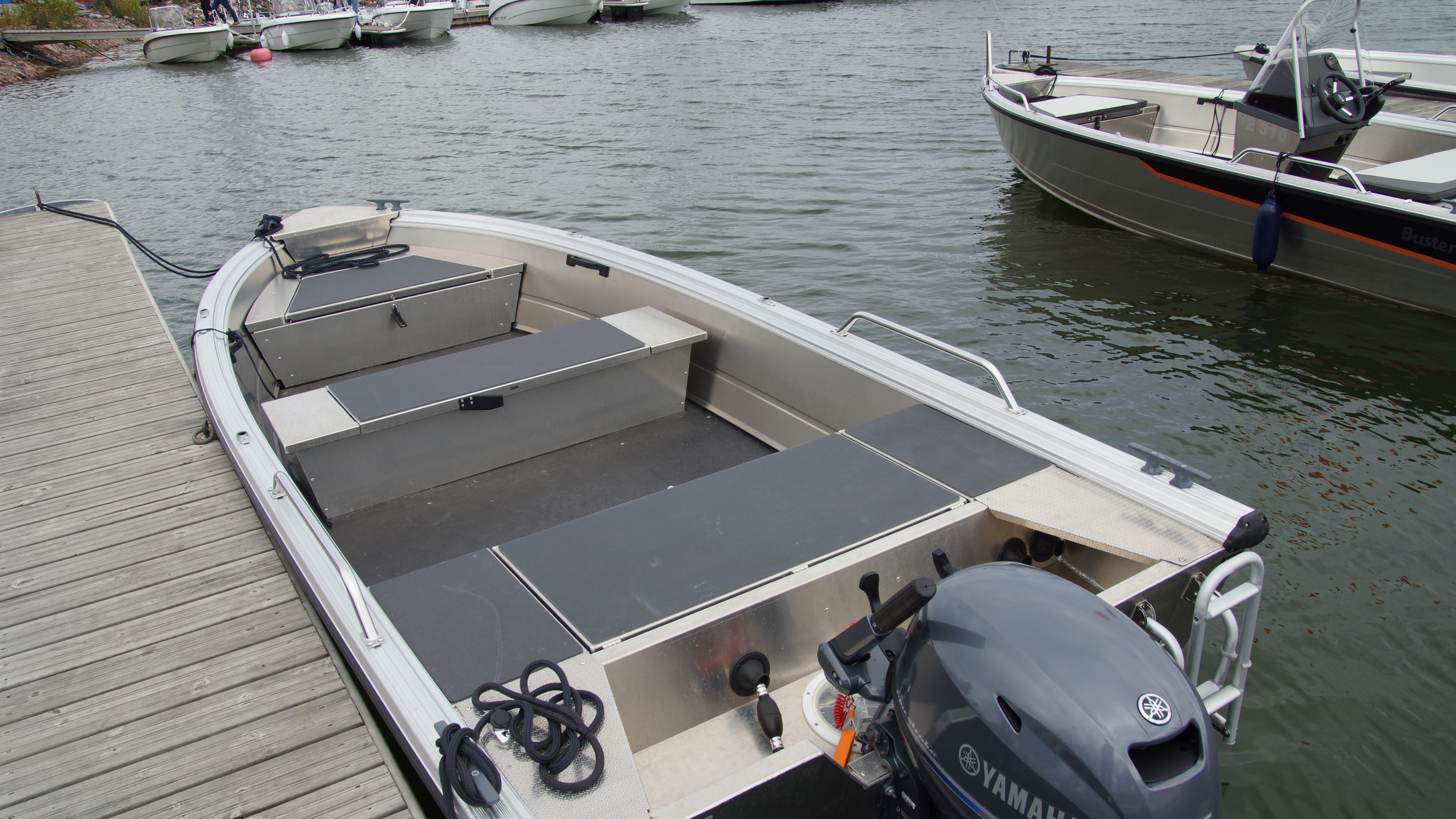 Buster S -alumiinivene Helsingin uivassa venenäyttelyssä Lauttasaaressa elokuussa 2016.